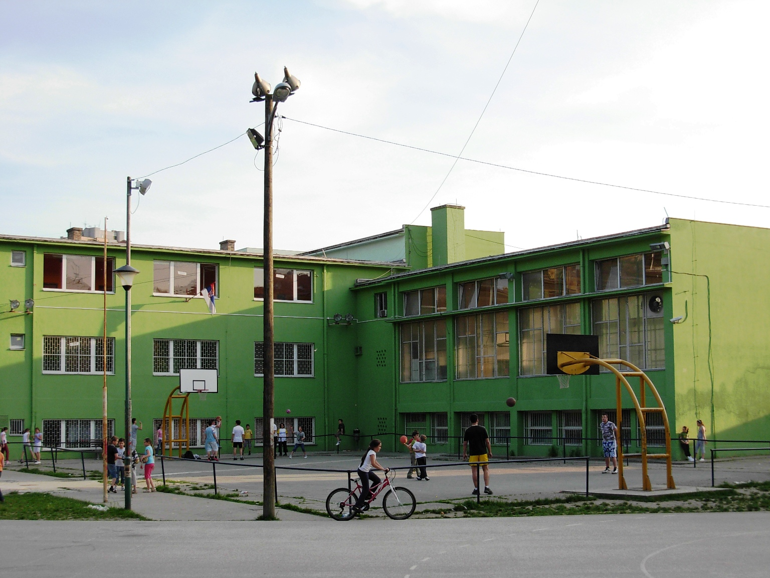 Osnovna škola "Sonja Marinković" u Novom Sadu.